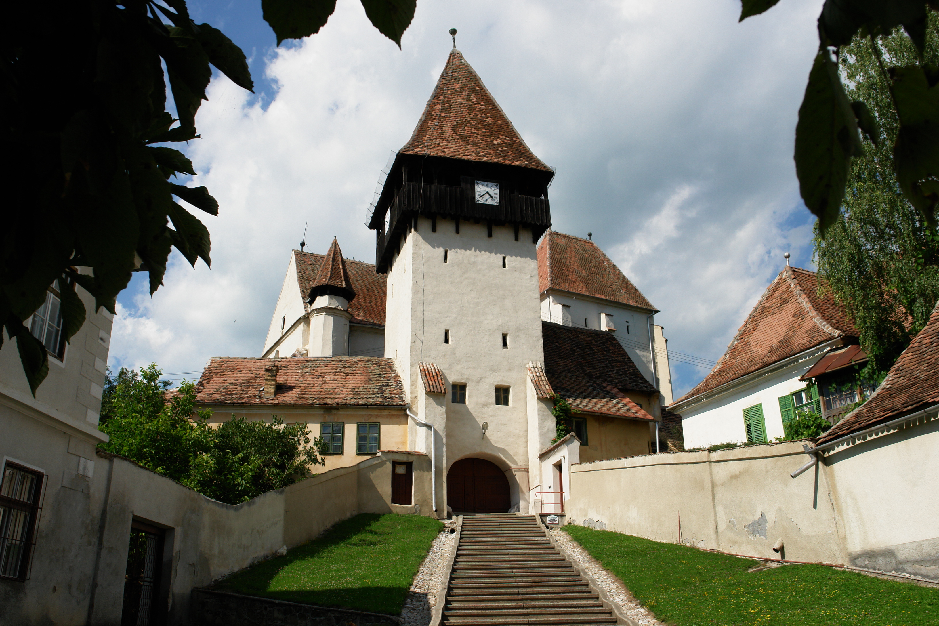 Bázna erődtemploma.